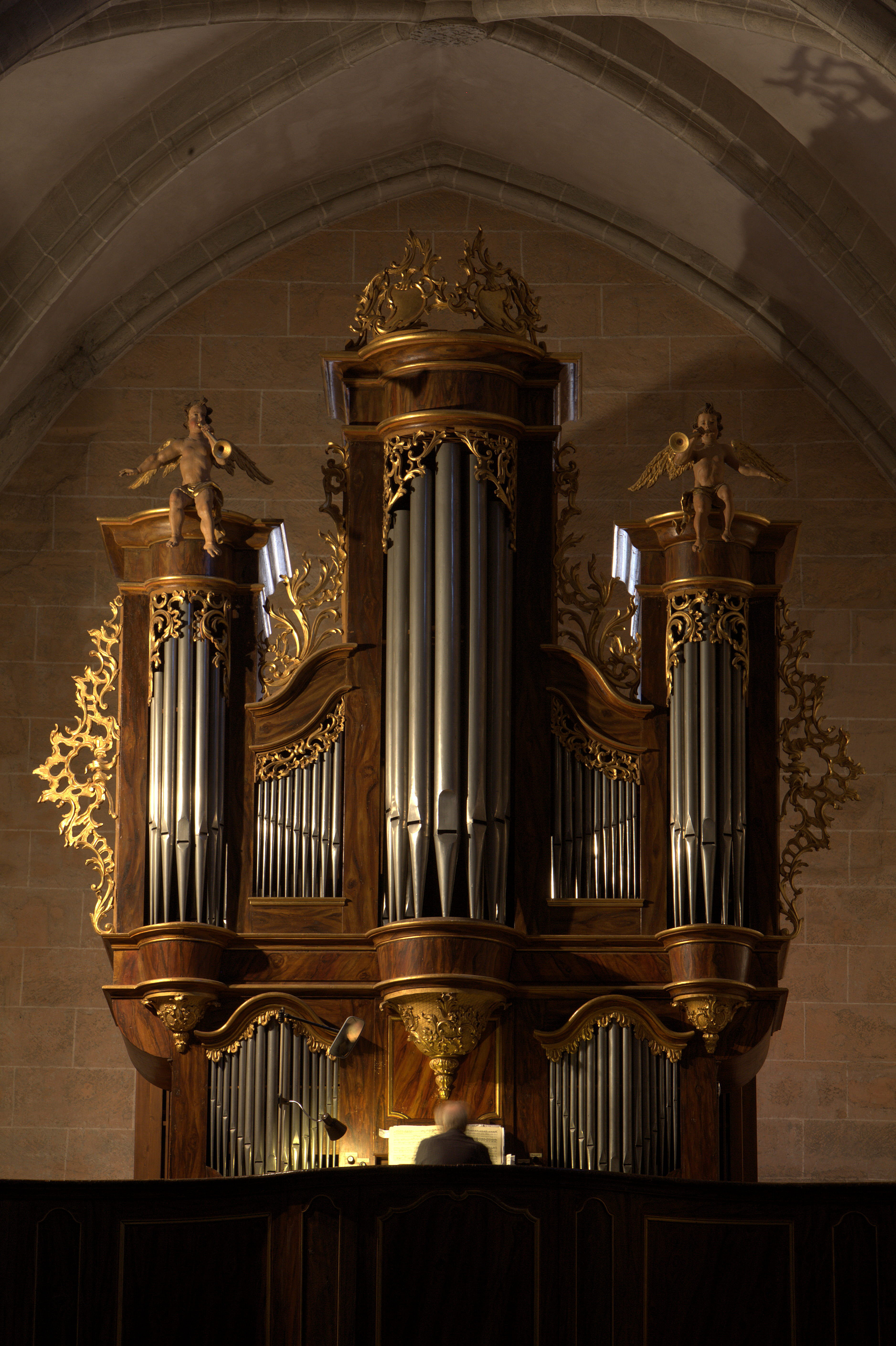 Église de Saint-Etienne, Moudon